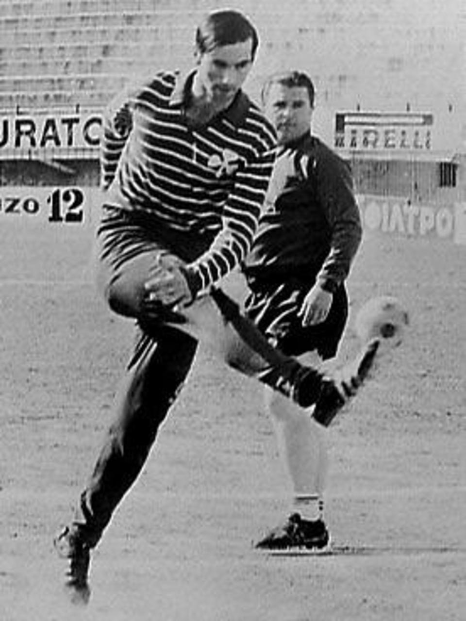 Spits Antonis Antoniadis traint onder leiding van Puskas